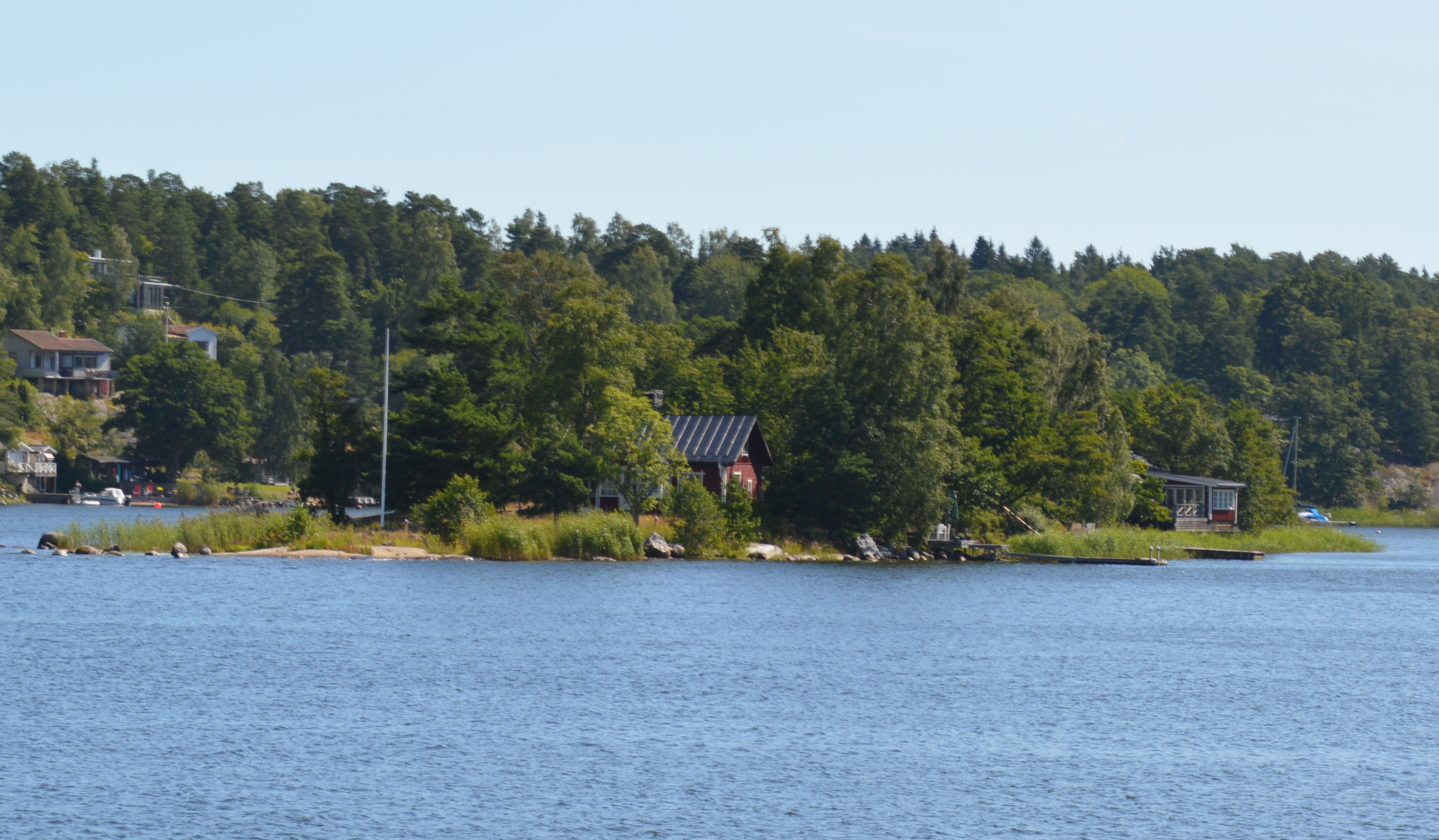 Insel Mandan